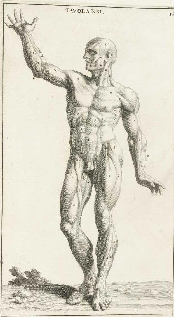 Muscles